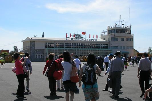 Lien Khuong airport, Da Lat, Vietnam.